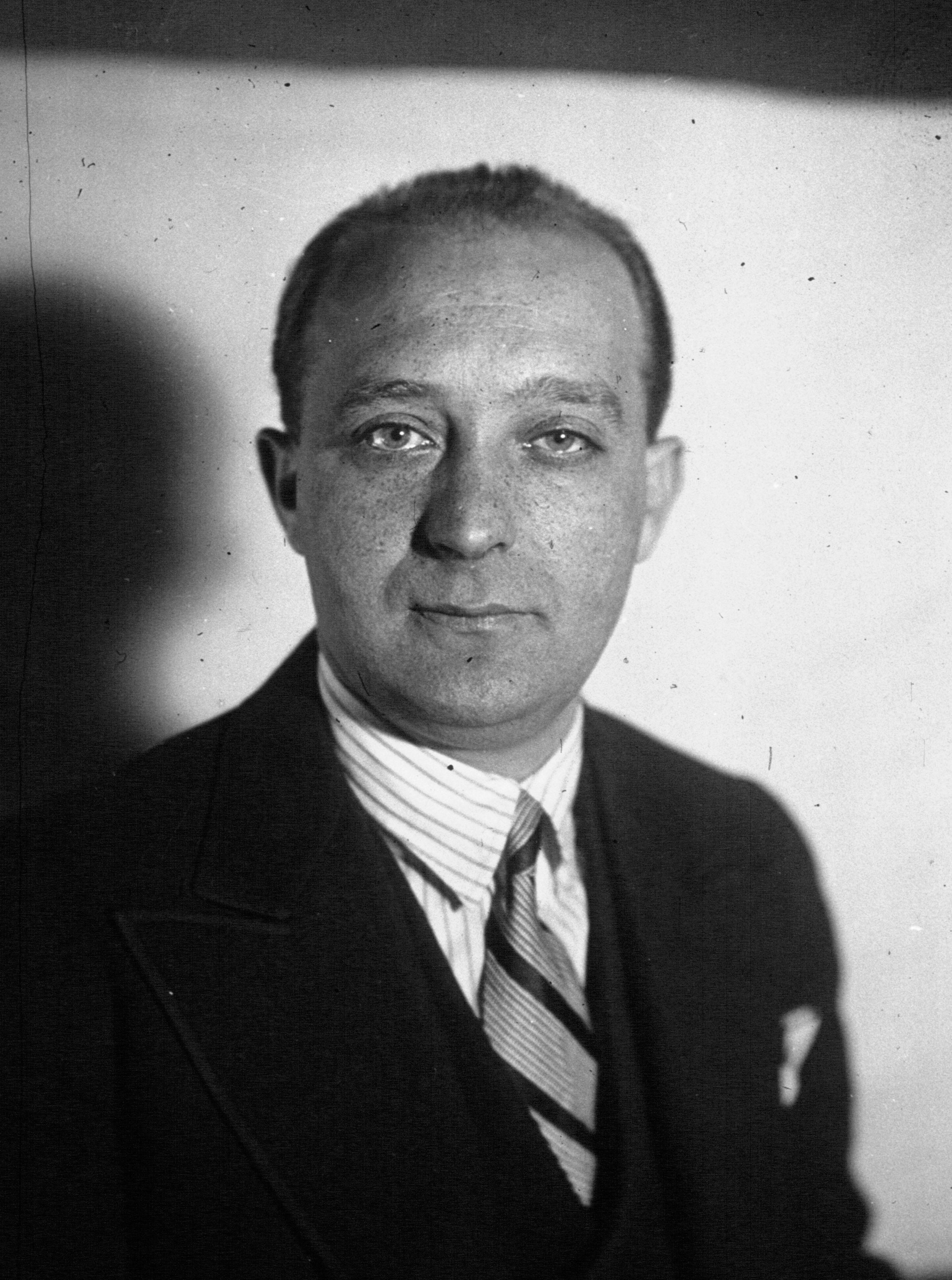 Martinaud Déplat, député de la Seine [photographie de presse]